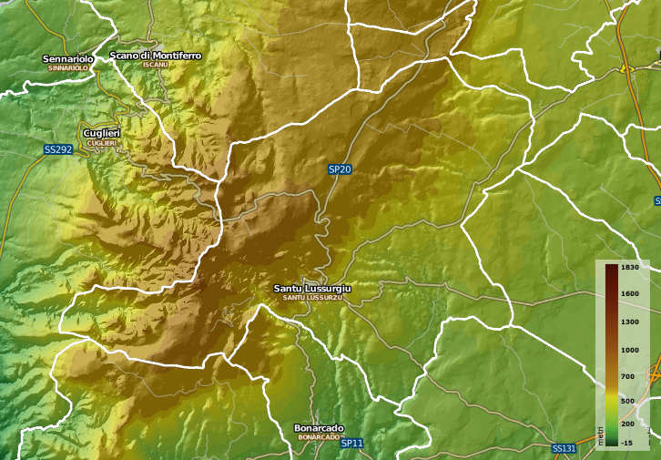 Morfologia del territorio di Santu Lussurgiu. I confini amministrativi sono segnati in bianco. La legenda riporta la quota altimetrica.